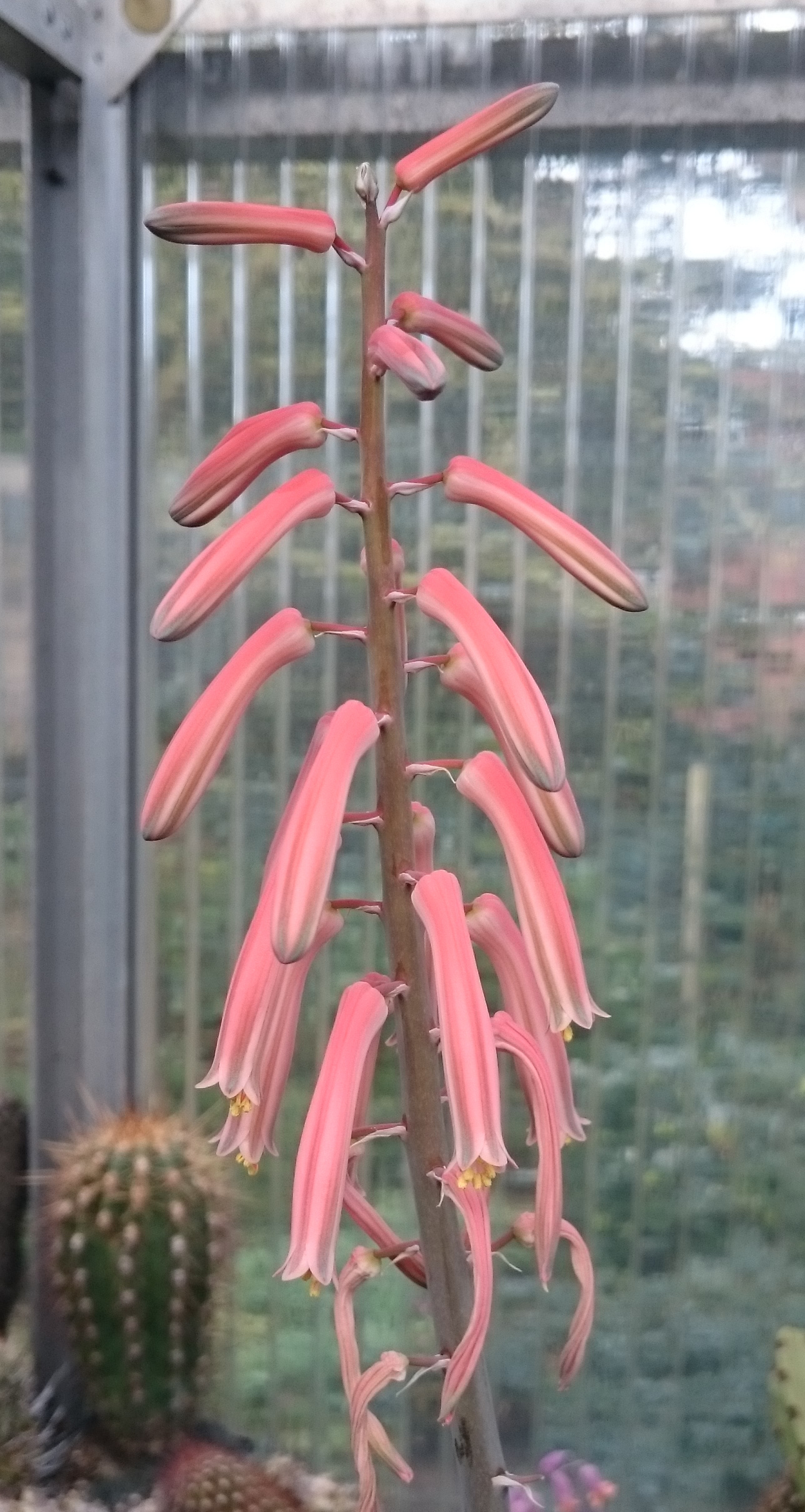 Blüte von Gonialoe variegata